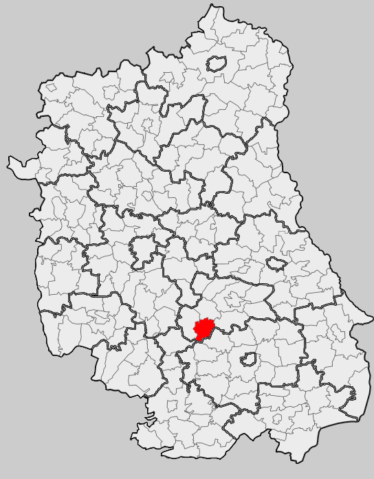 Map of gmina Rudnik, Krasnystaw county, Lublin voivodship Mapa gminy Rudnik, powiat krasnostawski, województwo lubelskie